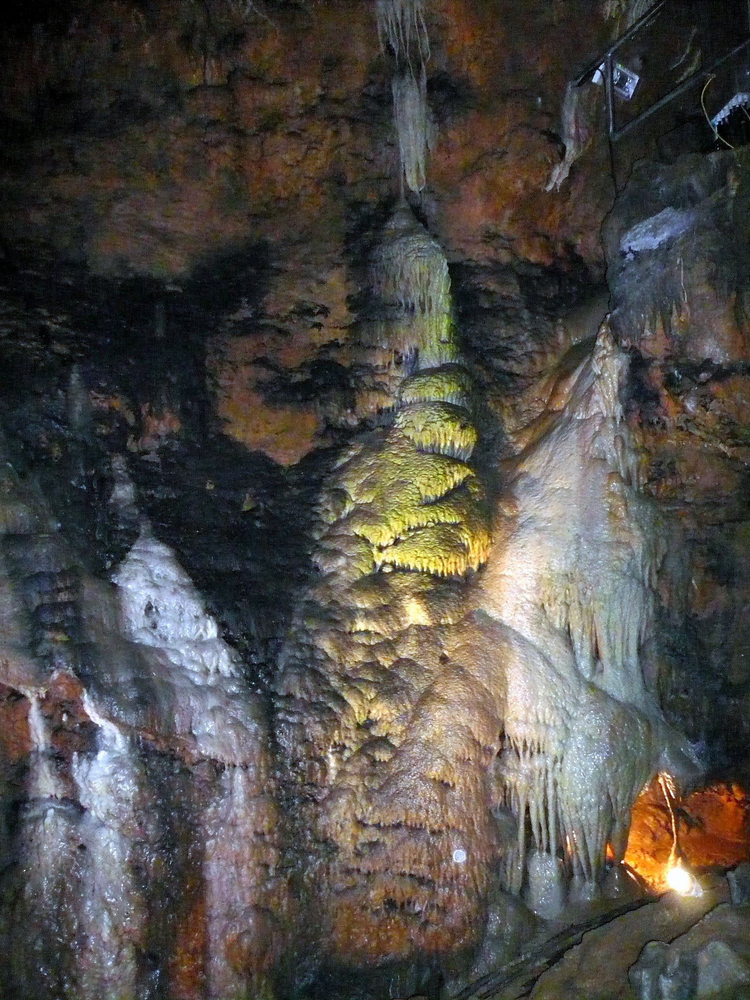 Sophienhöhle, Wasserfall